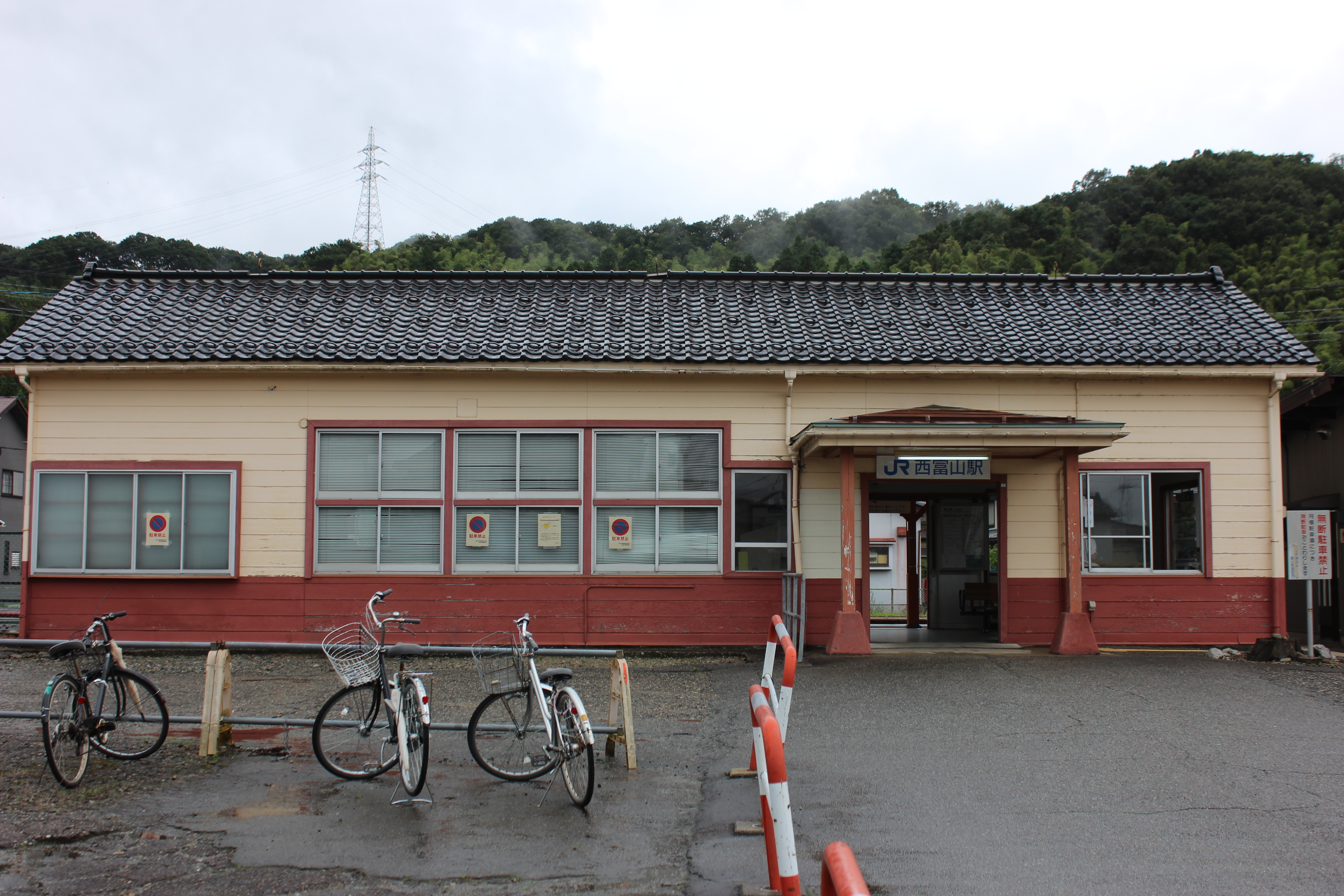 西富山駅（富山県富山市） Canon EOS Kiss X5